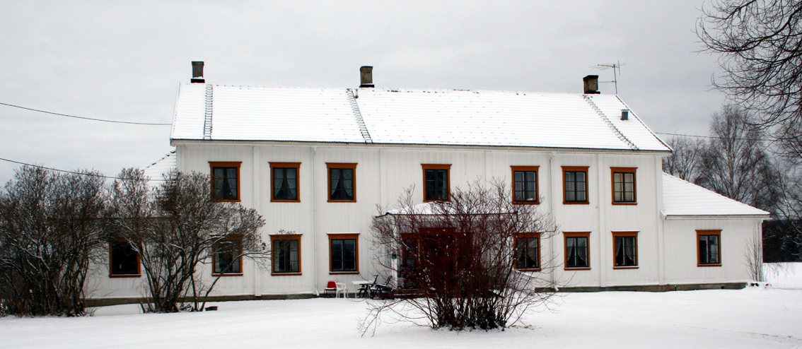 Løten prestegard, hovedbygningen. Freda.